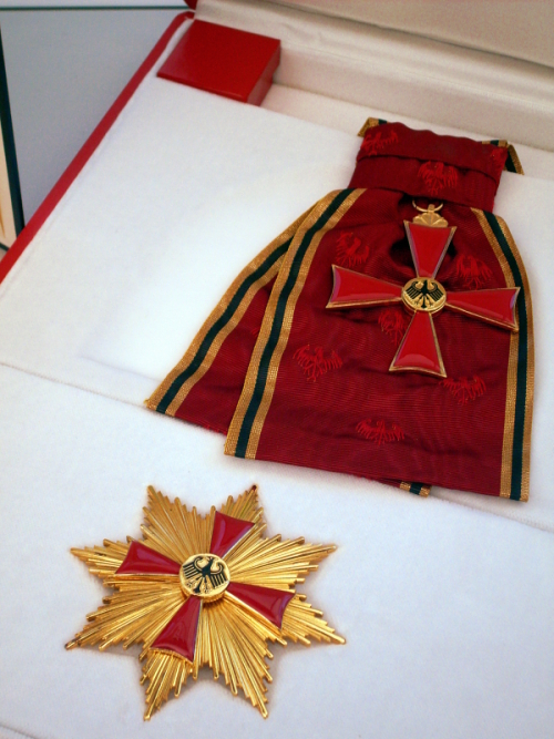 Sonderstufe des Großkreuzes des Verdienstordens der Bundesrepublik Deutschland im Verleihungsetui